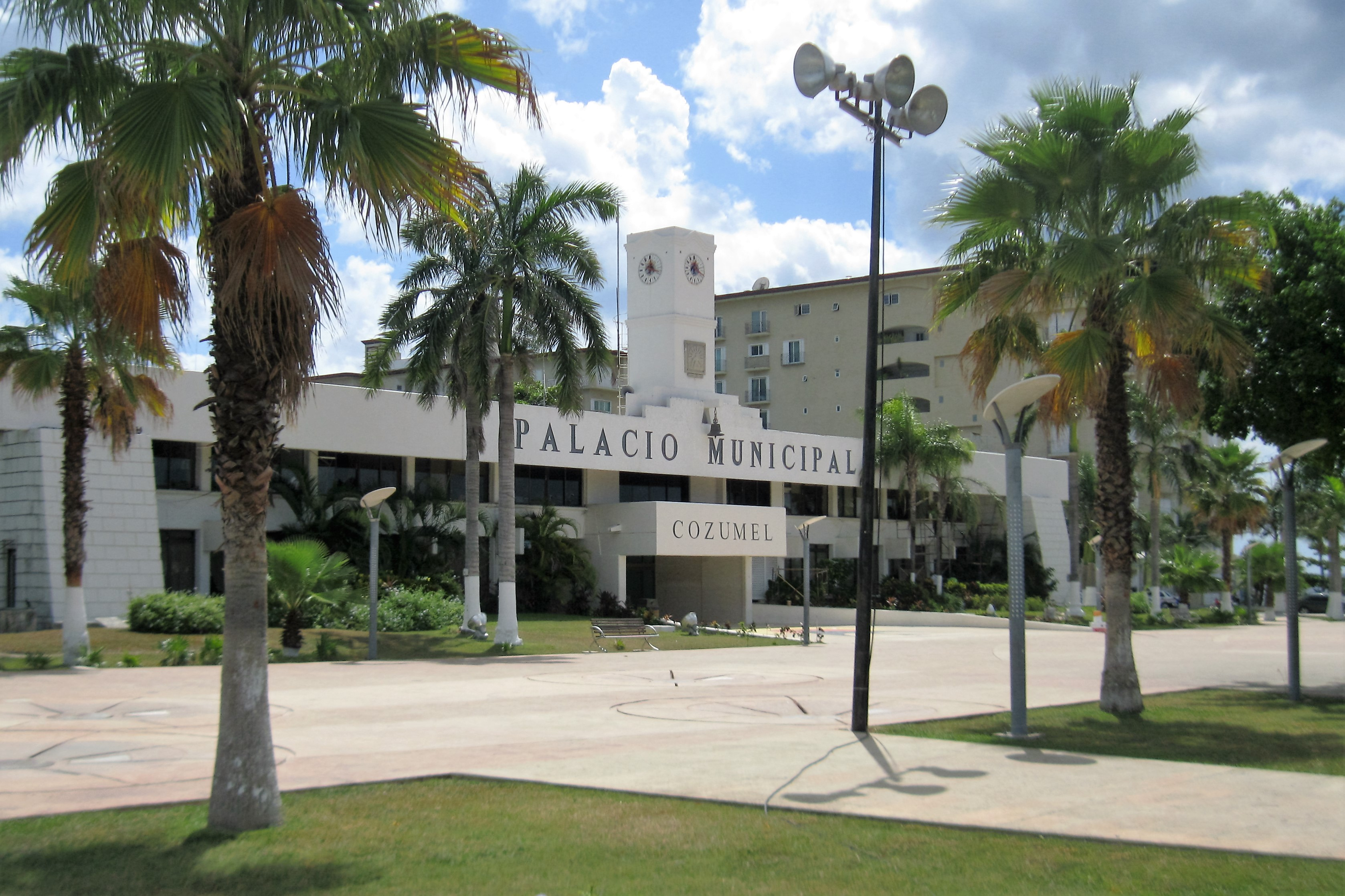 Municipal government headquarters, Cozumel Municipality, Mexico